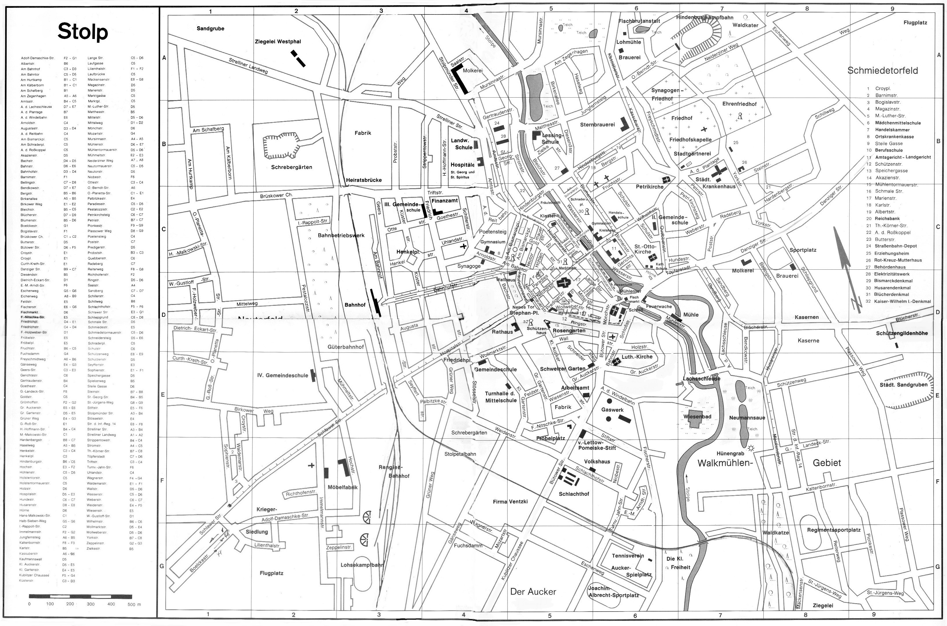 Plan Słupska w 1945